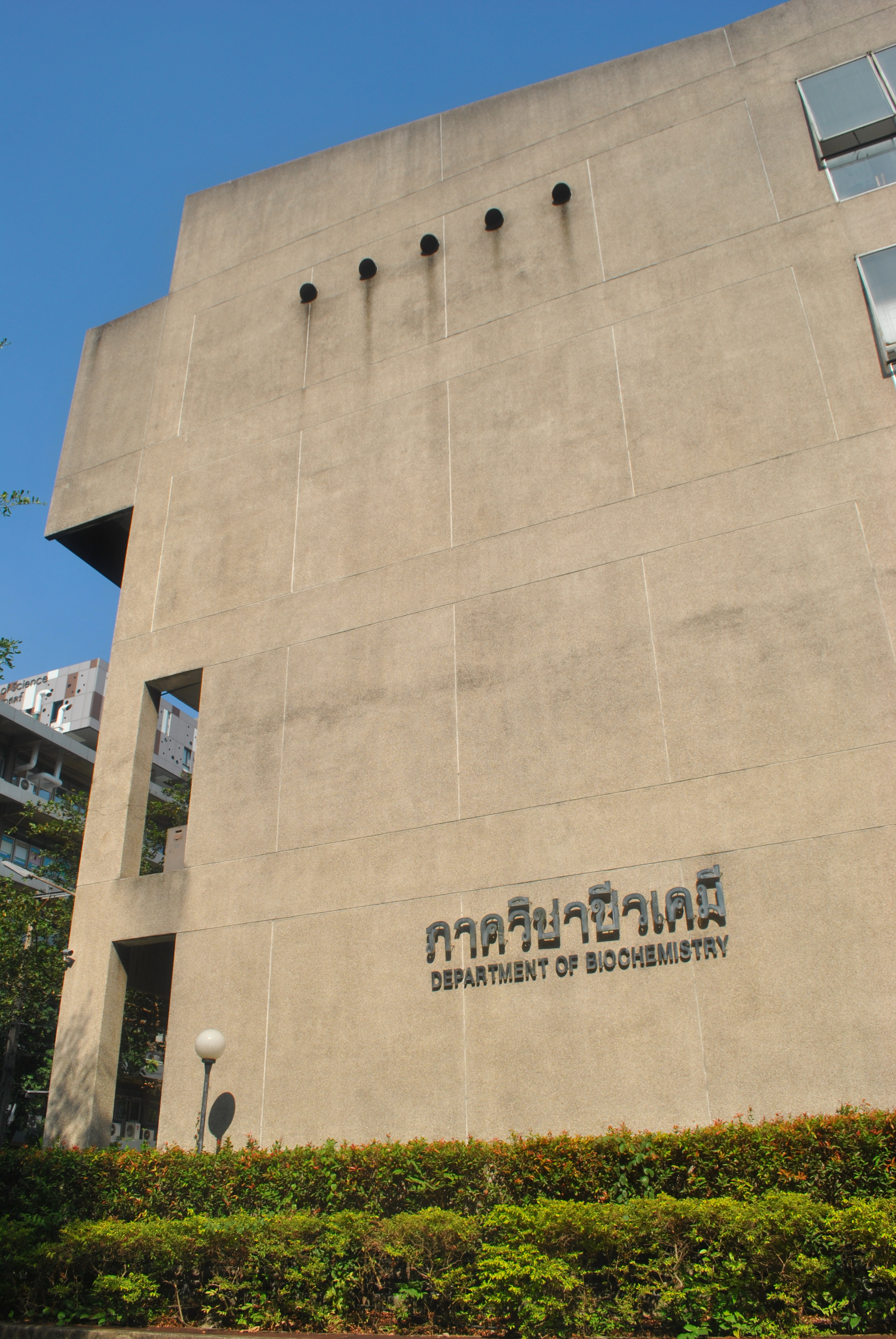 ตึกชีวเคมี คณะวิทยาศาสตร์ มหาวิทยาลัยเกษตรศาสตร์